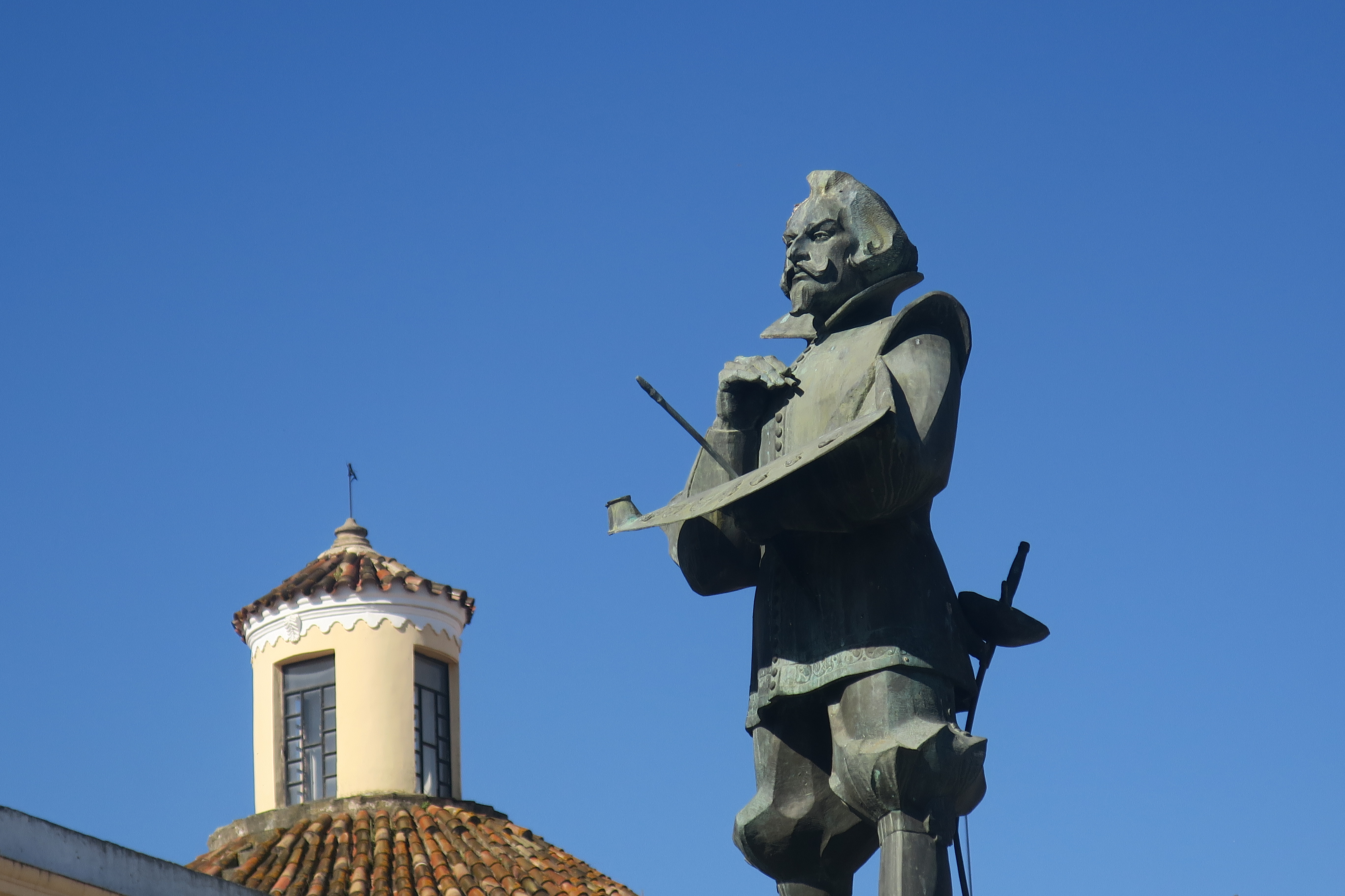 Badajoz (Plaza de Cervantes/San Andrés). Vista parcial del monumento a Zurbarán, obra del artista español Aurelio Cabrera Gallardo (Alburquerque –Badajoz–, 16 de enero de 1870-Toledo, 26 de noviembre de 1936).